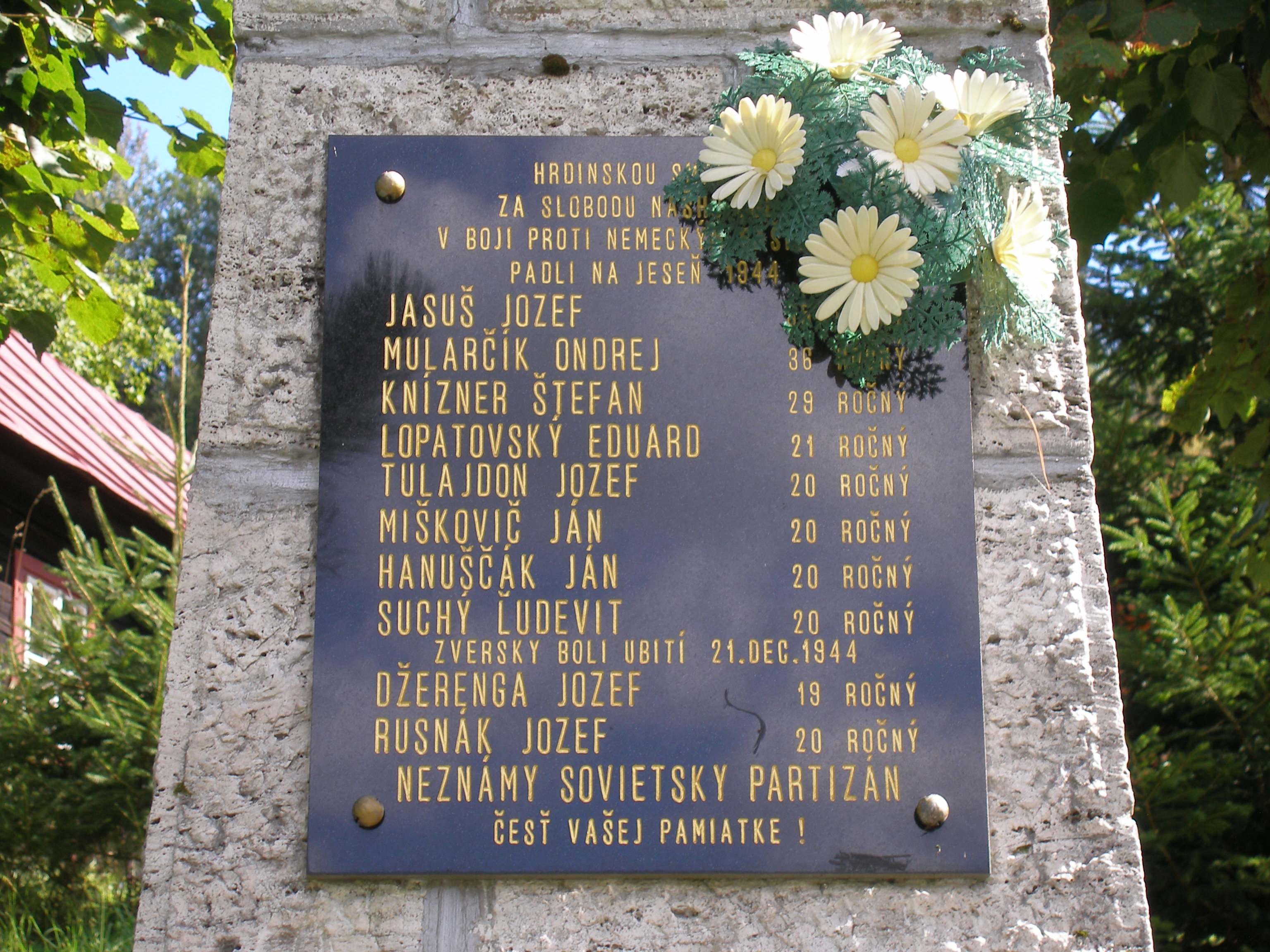 Spišská obec Henclová okres Gelnica.